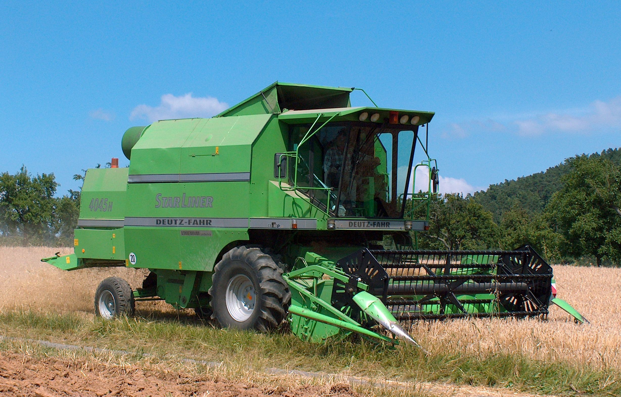 Deutz-Fahr StarLiner 4045H beim dreschen